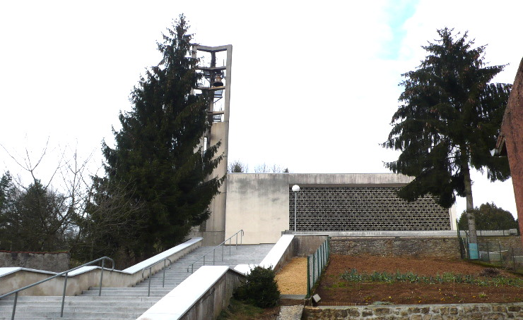 Kierch Escherange